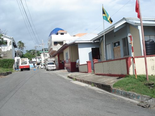 Morant Bay, Jamaika